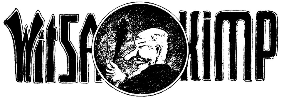 Ajakirja Witsakimp päismik